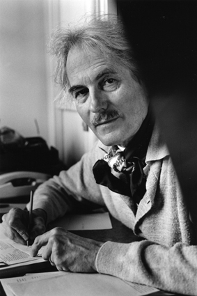 Walter Weideli (1988), écrivain et journaliste